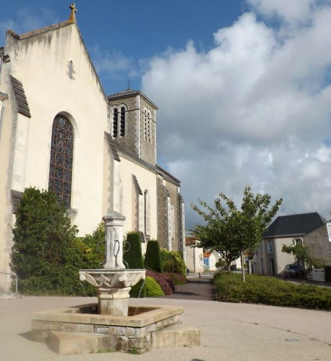 Eglise de la Génétouze en Vendée